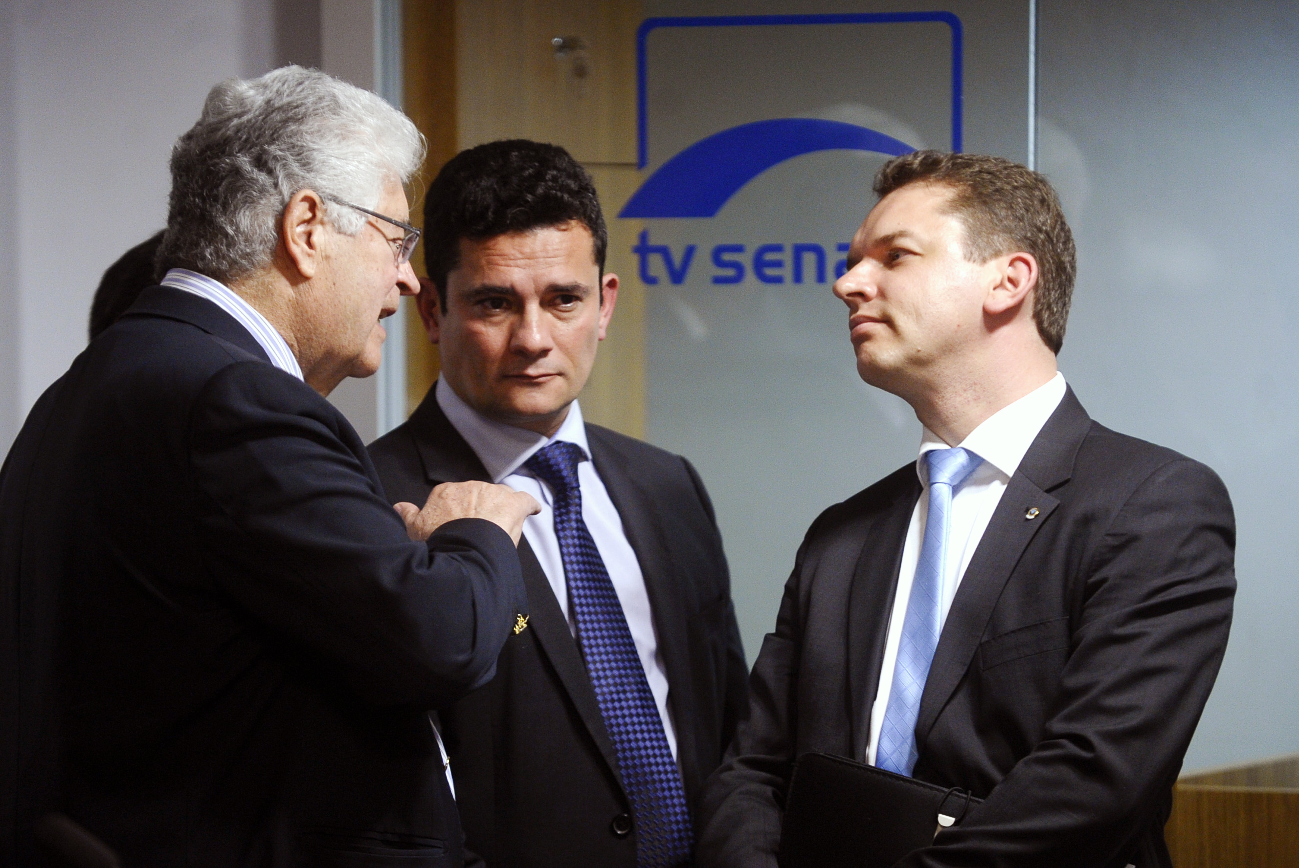 Comissão de Constituição, Justiça e Cidadania (CCJ) realiza audiência pública interativa para instruir o PLS 402/2015, que altera o Código de Processo Penal, em relação aos recursos. Bancada (E/D): senador Roberto Requião (PMDB-PR); juiz federal, Sérgio Fernando Moro; presidente da Associação dos Juízes Federais do Brasil (Ajufe), Antônio César Bochenek Foto: Marcos Oliveira/Agência Senado